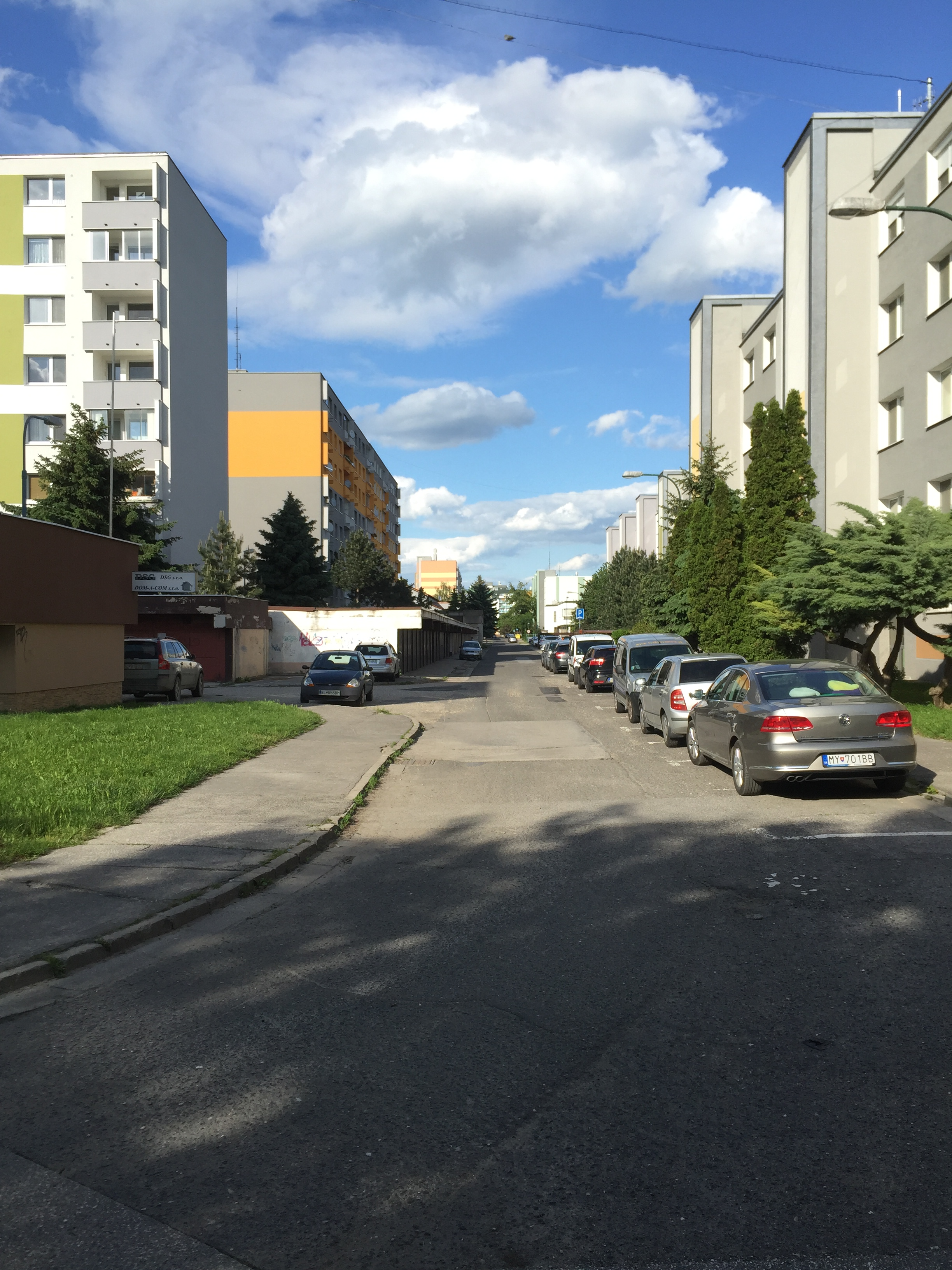 Toryská, Vrakuňa, Bratislava